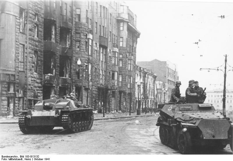 An der Sowjetfront: Deutsche Sturmgeschütze und Panzerspähwagen fahren in den Hauptstrassen umher, um etwa aufflackernden Widerstand niederzukämpfen. PK-Aufnahme: Kriegsberichter: Mittelstaedt 10133-41 "Fr." "Fr.OKW" Okt.41 Information added by Wikimedia users.Площадь Розы Люксембург, 10, угол пл. Тевелева, гостиница "Астория", октябрь (после 25) 1941.